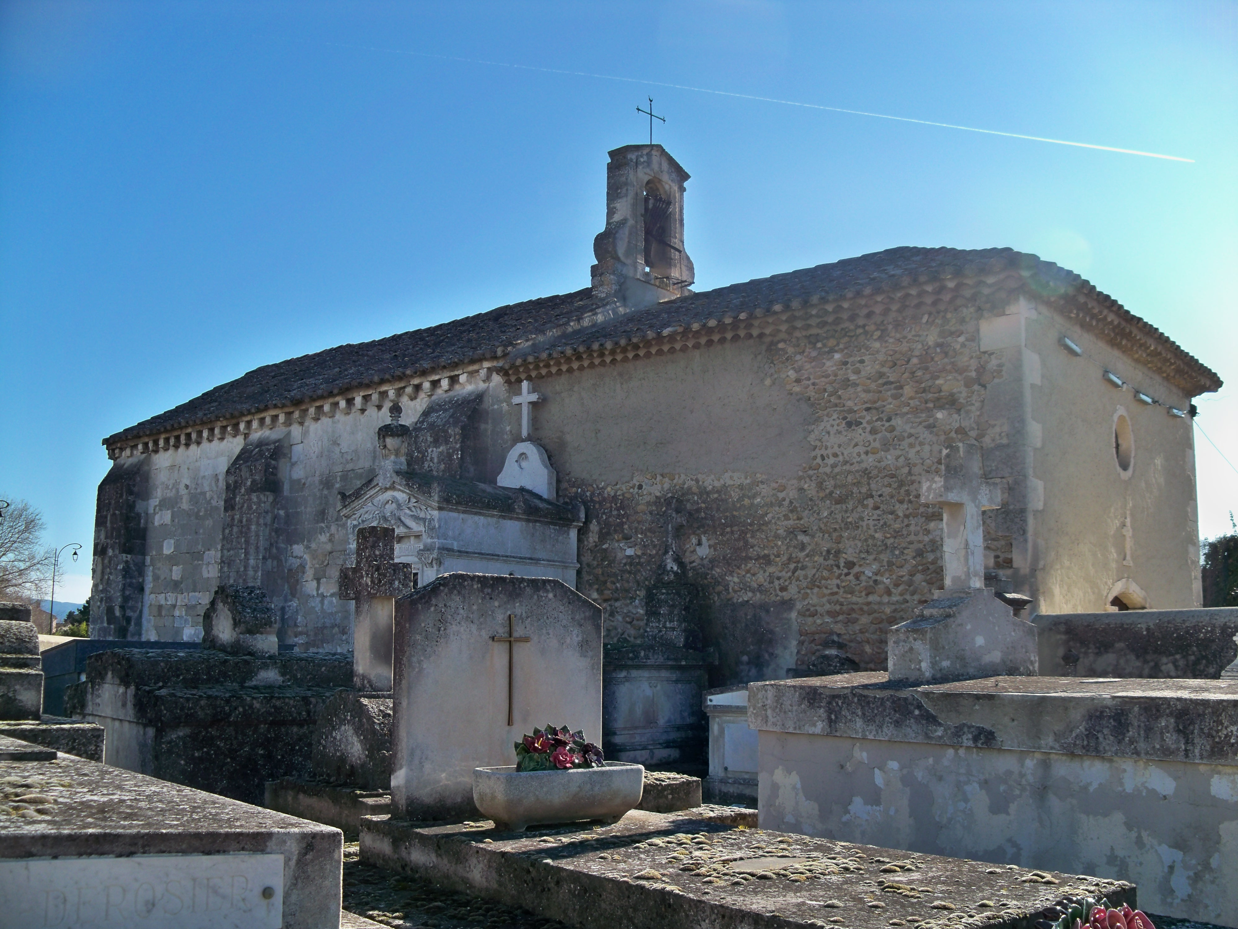 Chapelle Saint Michel de Cabannes (13)